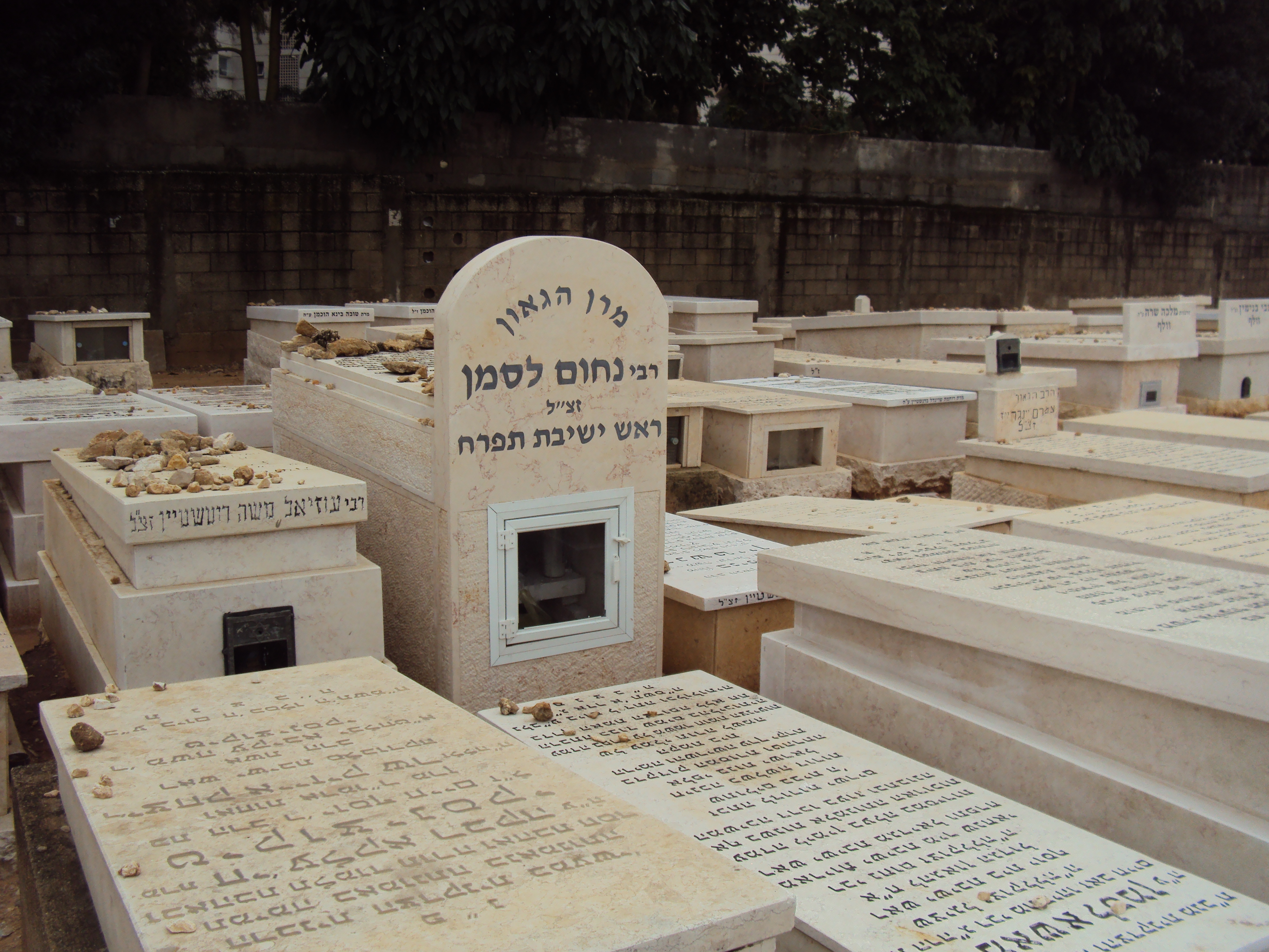 קברי הרב נחום לסמן והרב עוזיאל משה רוטשטיין בבית הקברות שומרי שבת, זכרון מאיר, בני ברק